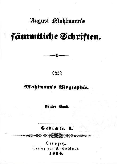 Titelblatt des ersten Bandes der Gesammelten Werke Siegfried Gustav Mahlmanns